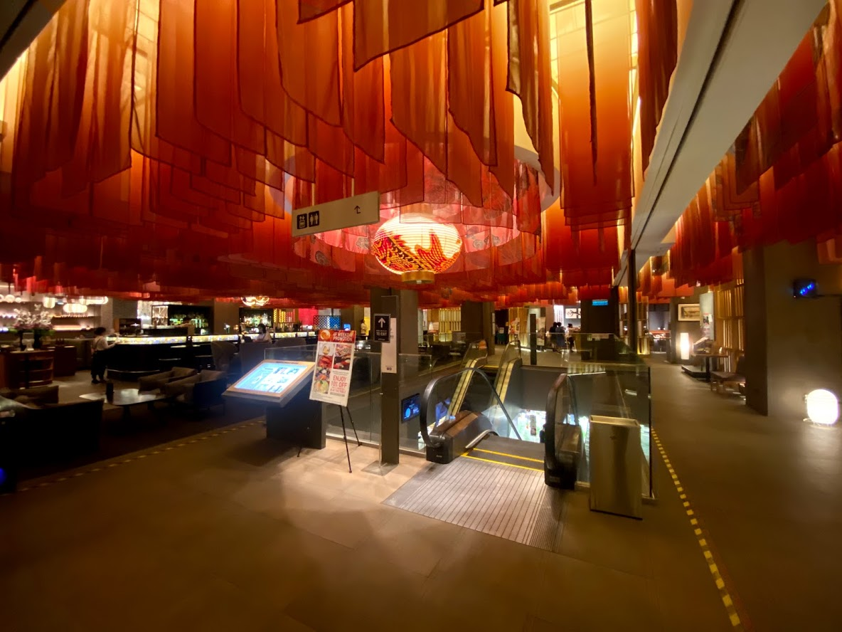 伊勢丹樂天百貨店六樓